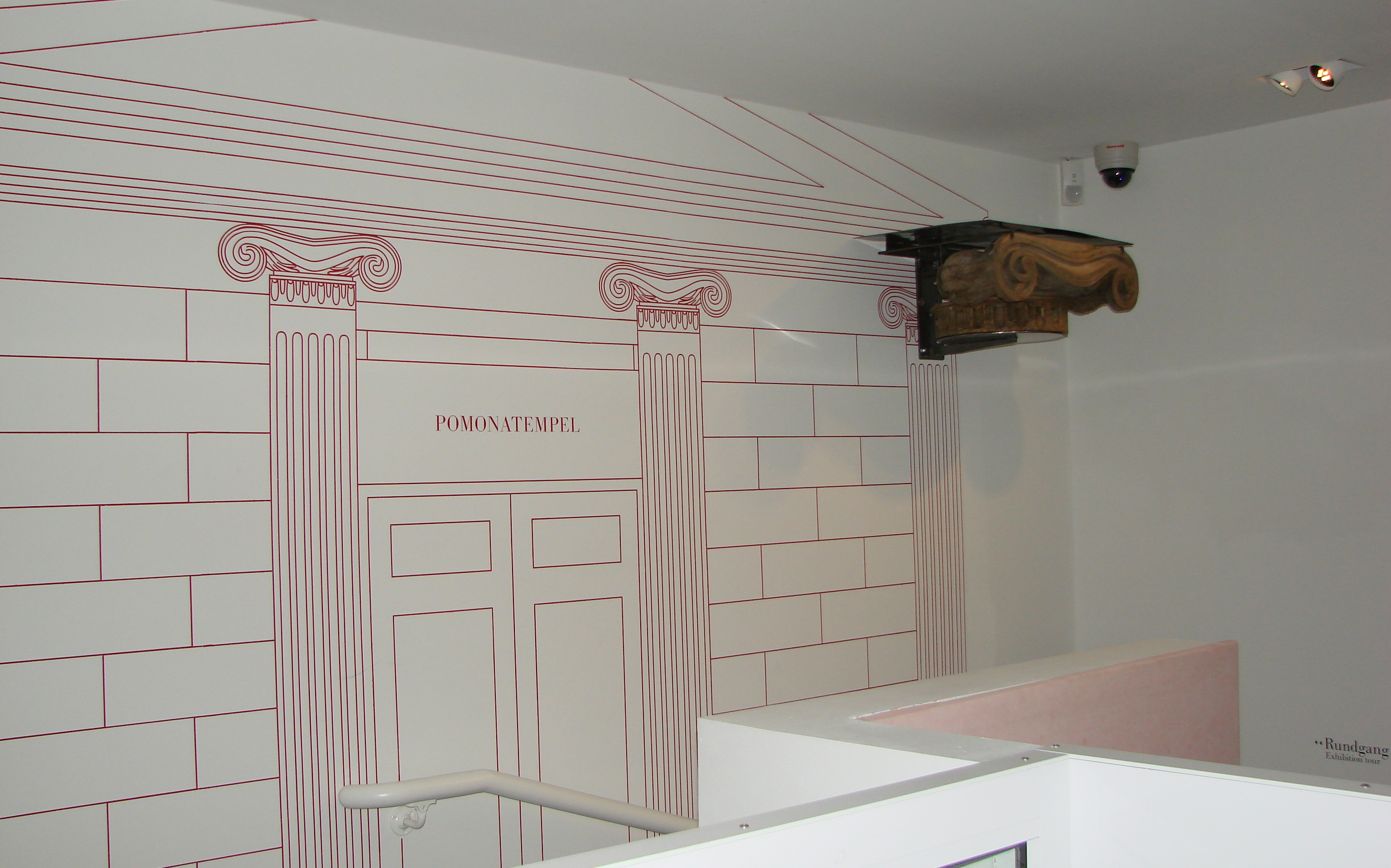 Originales Bruchstück des Pomonatempels